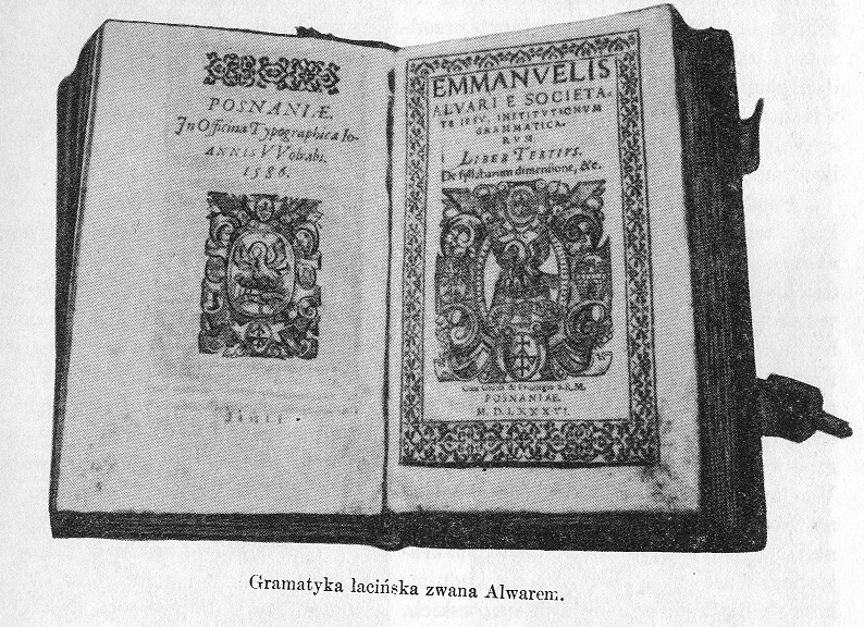 Gramatyka łacińska zwana Alwarem